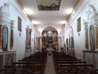 Interno della chiesa di San Giuseppe di Oppdo Mamertina